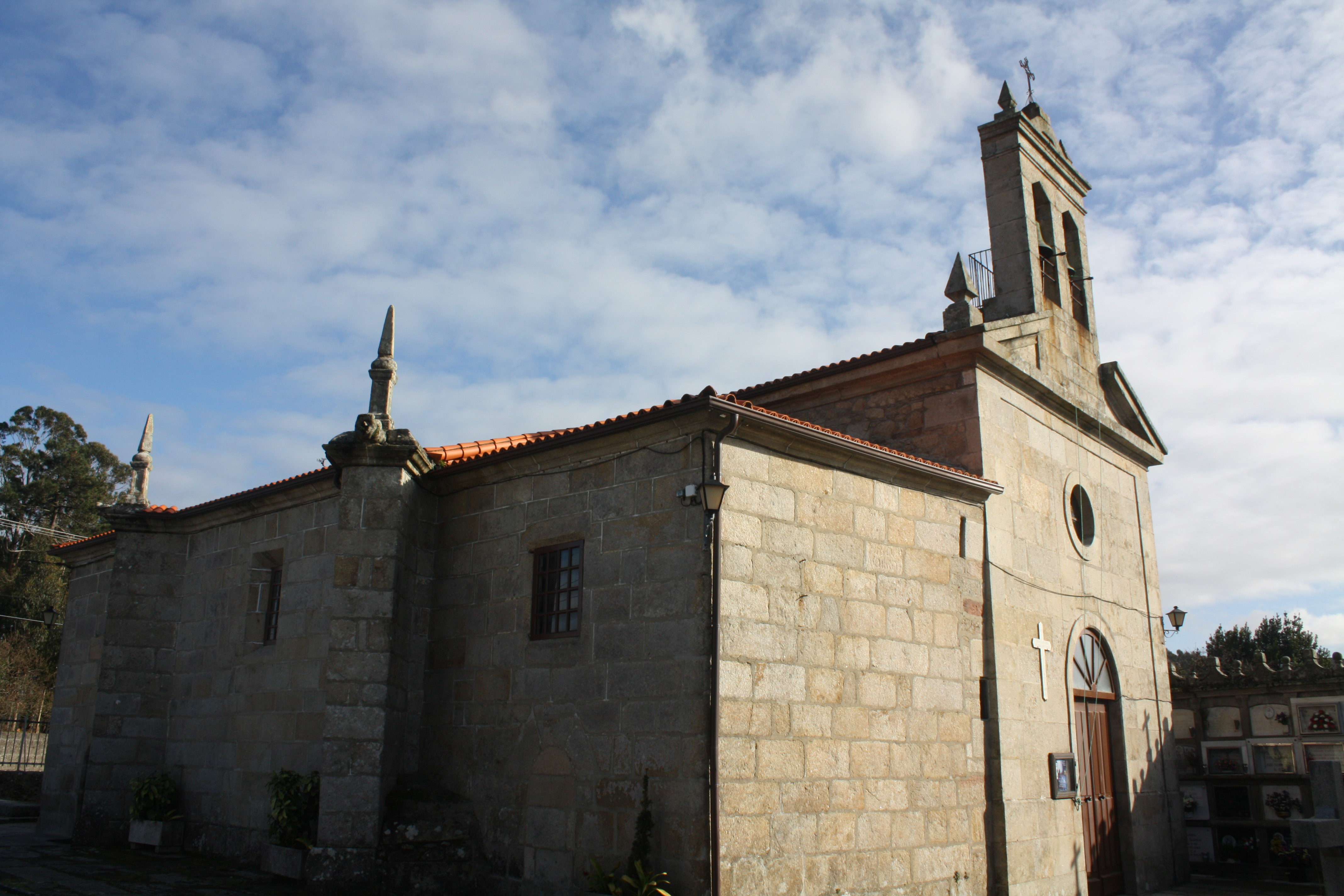 Igrexa de San Salvador de Sobradelo, Vilagarcía de Arousa (Pontevedra)